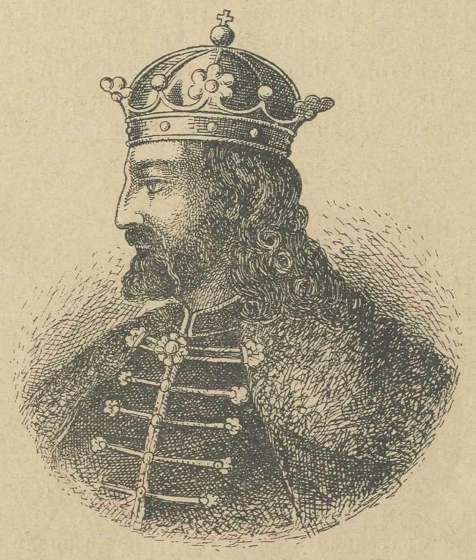 Бодин, краљ српски (1081 - после 1101)